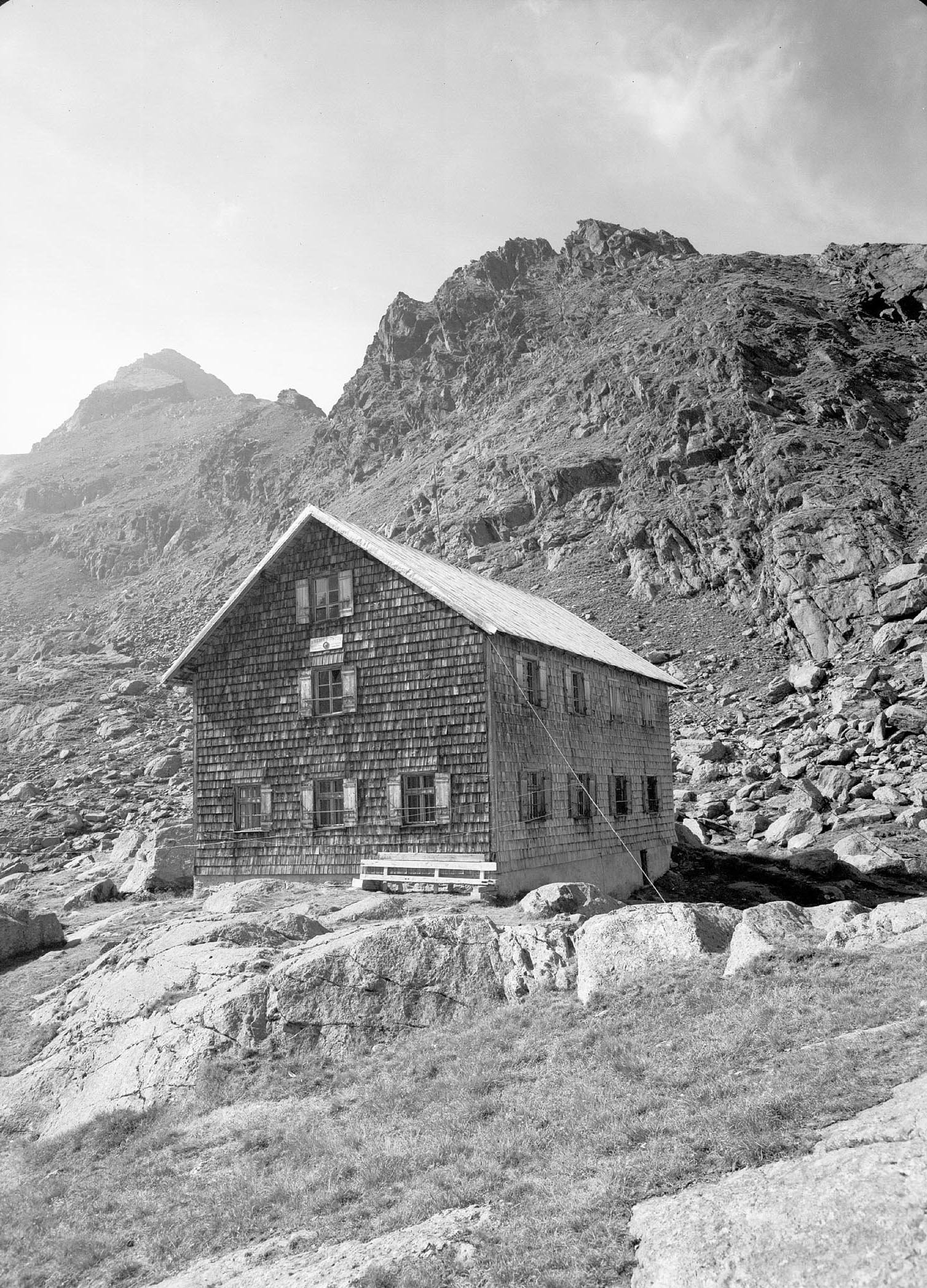 [Bremer Hütte gegen Innere Wetterspitze / Gschnitztal / Tirol]